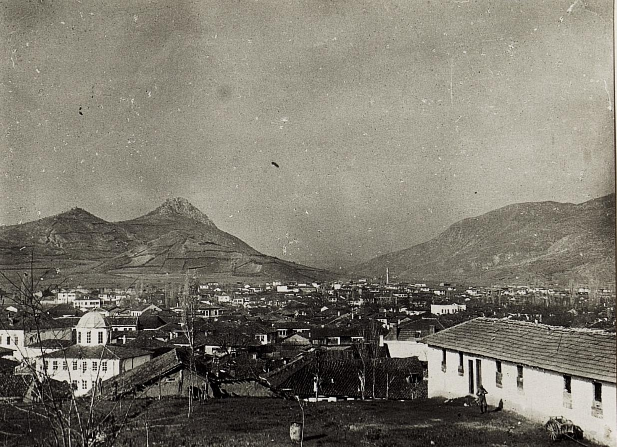 Mitrovica, Gesamtansicht.